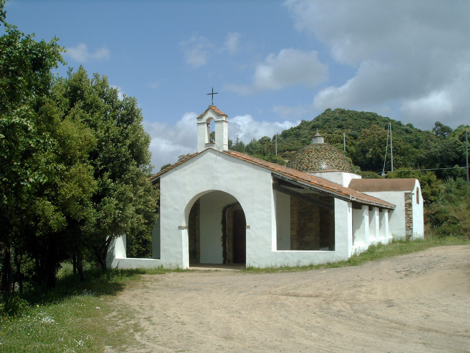 Chiesa campestre "s.Severa, Gonnosfanadiga